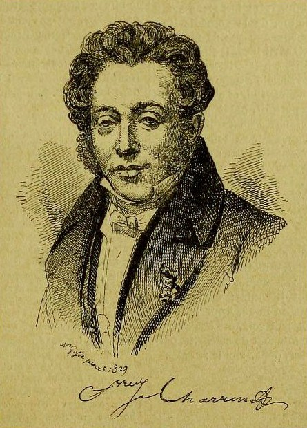 Portrait du chansonnier et goguettier Pierre-Joseph Charrin.